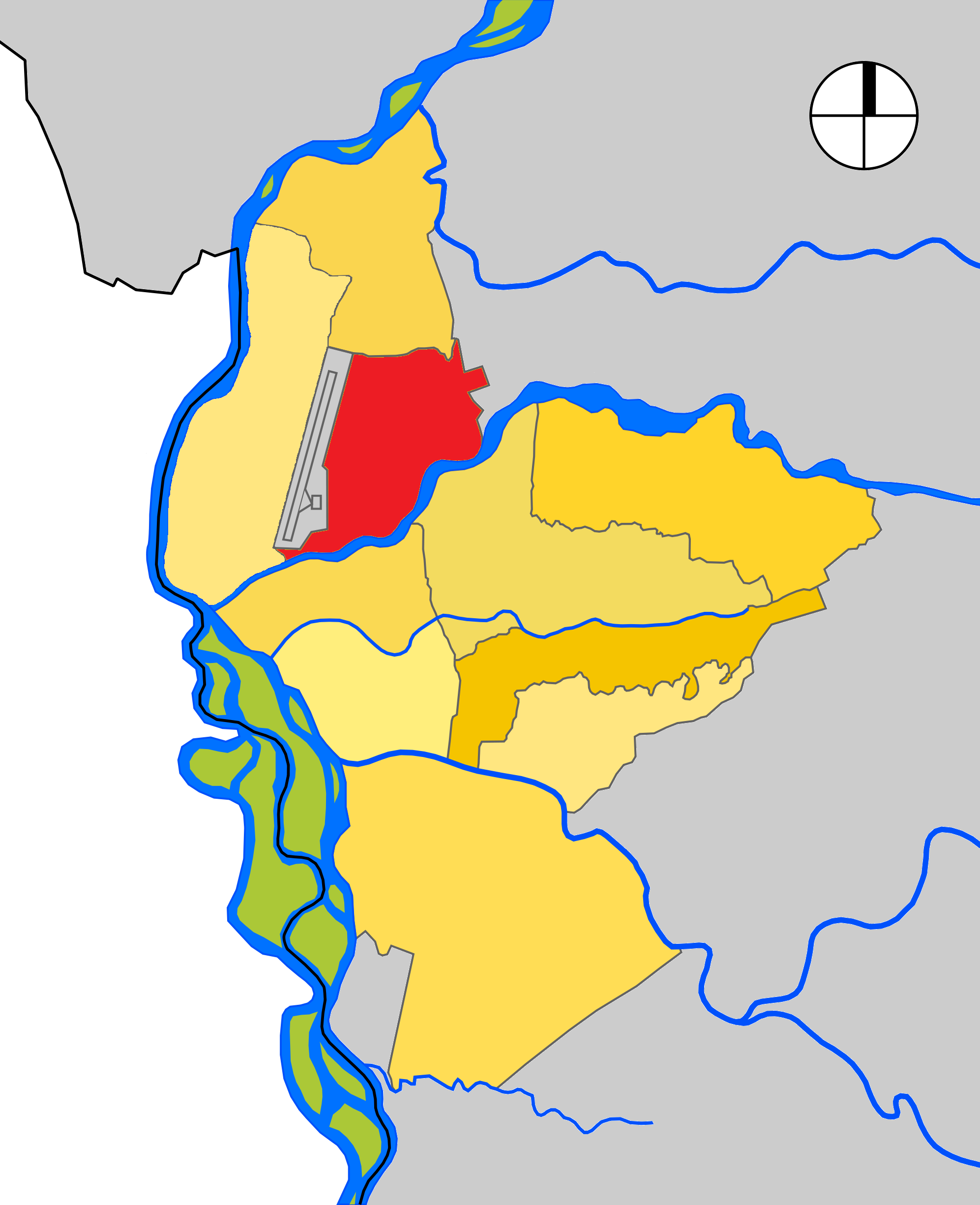 Mapa de las Comuna 2 de Neiva, departamento del Huila, Colombia.